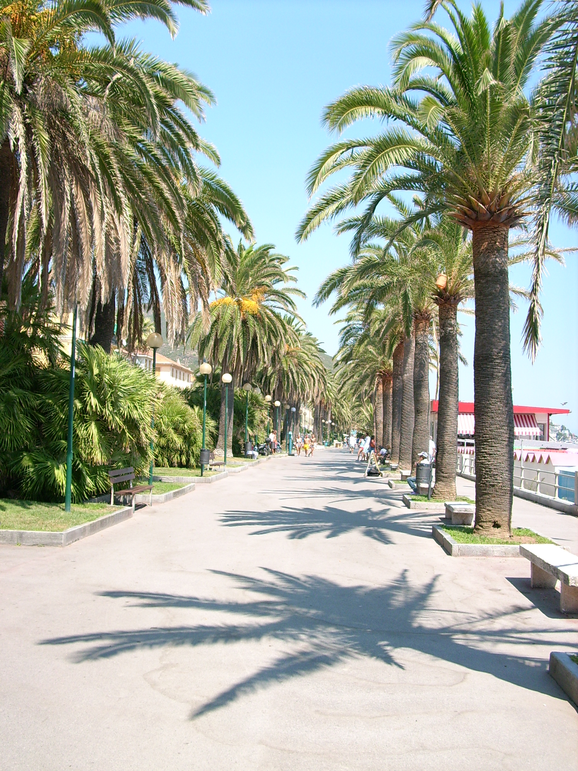 Lungomare di Varazze, Liguria, Italia